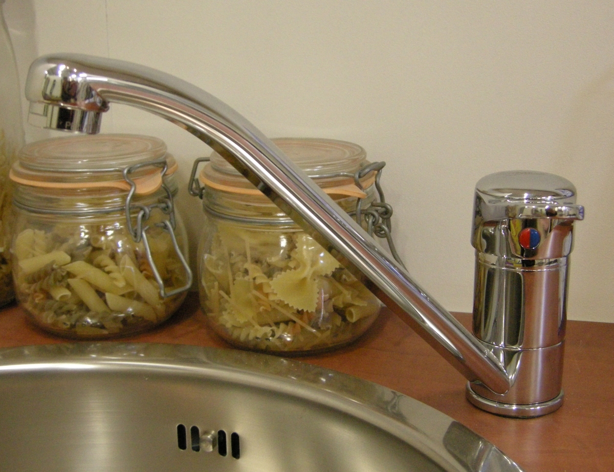 Een eenknopskeukenmengkraan